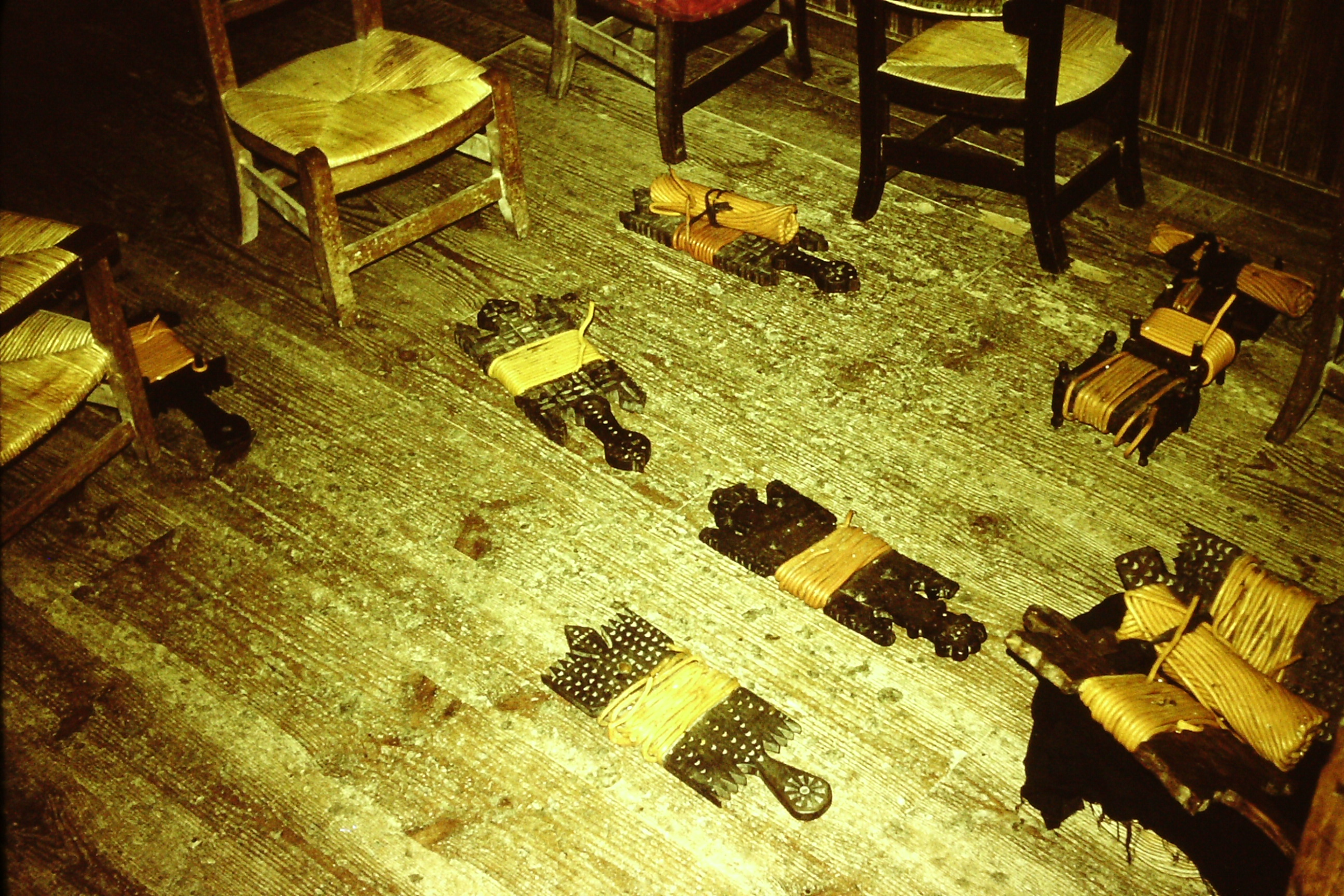 Argizaiolak Amezketan, 1970eko hamarkadan